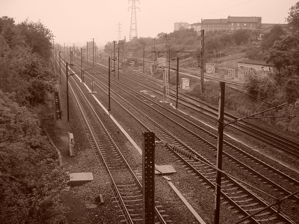 photographie collection personnel Utilisteur:Freddyz, photographie libre de droit sans copyright !